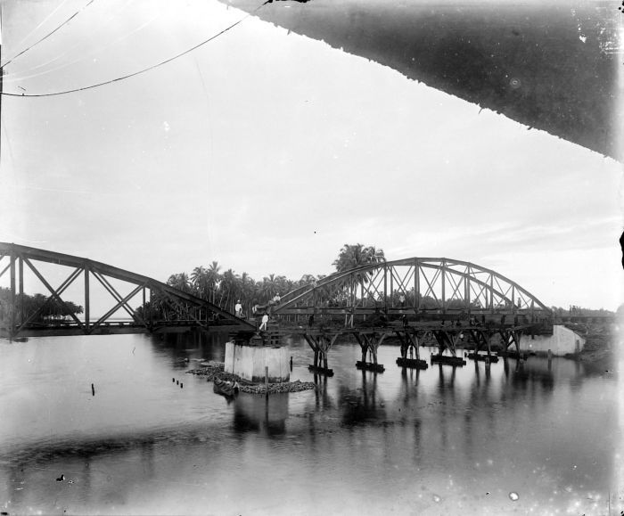 Negatief. Spoorbrug over de Soengei Boeloe rivier op de lijn Padang-Kajoe Tanam